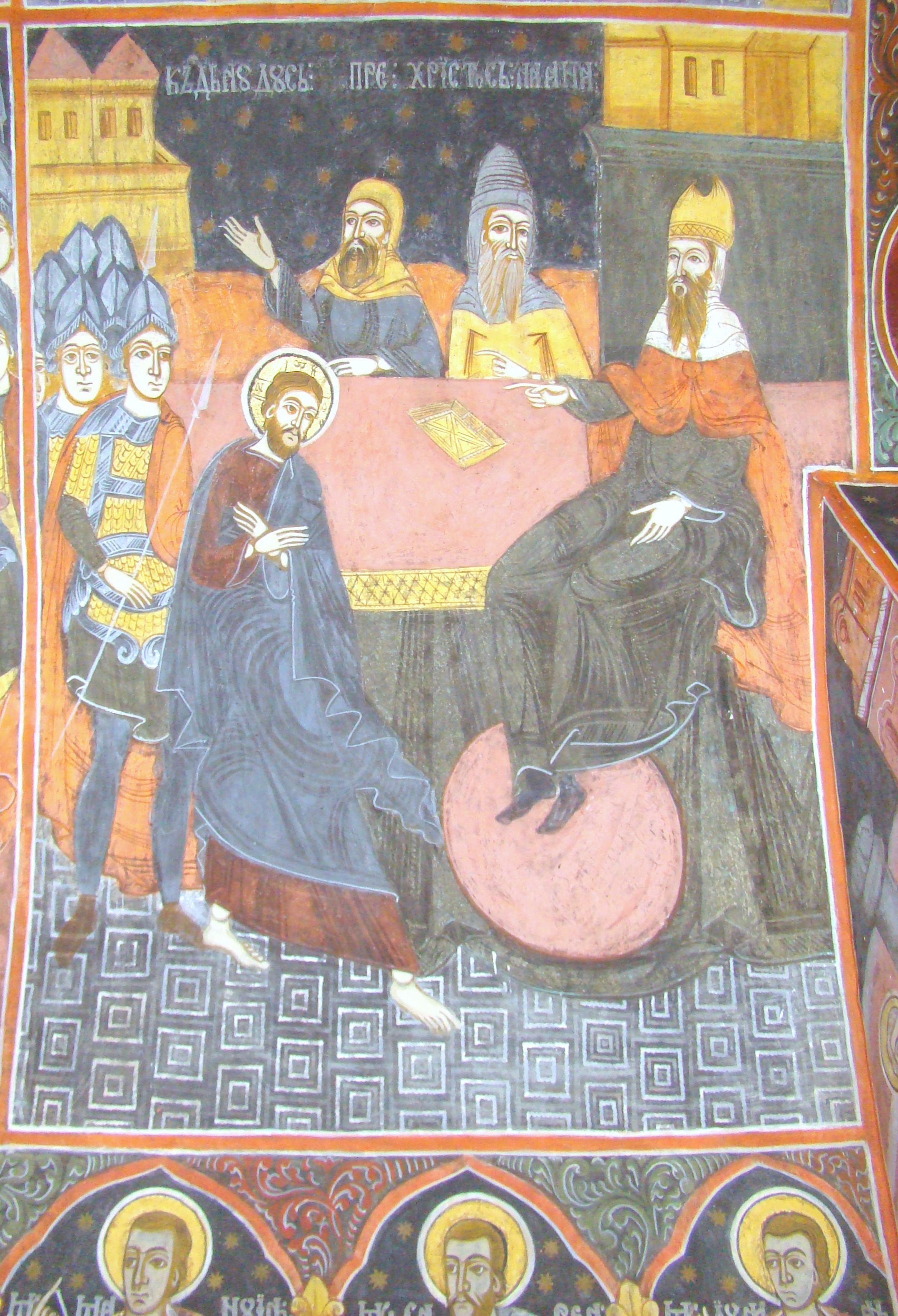 Biserica "Sf. Nicolae" din Mohu, județul Sibiu